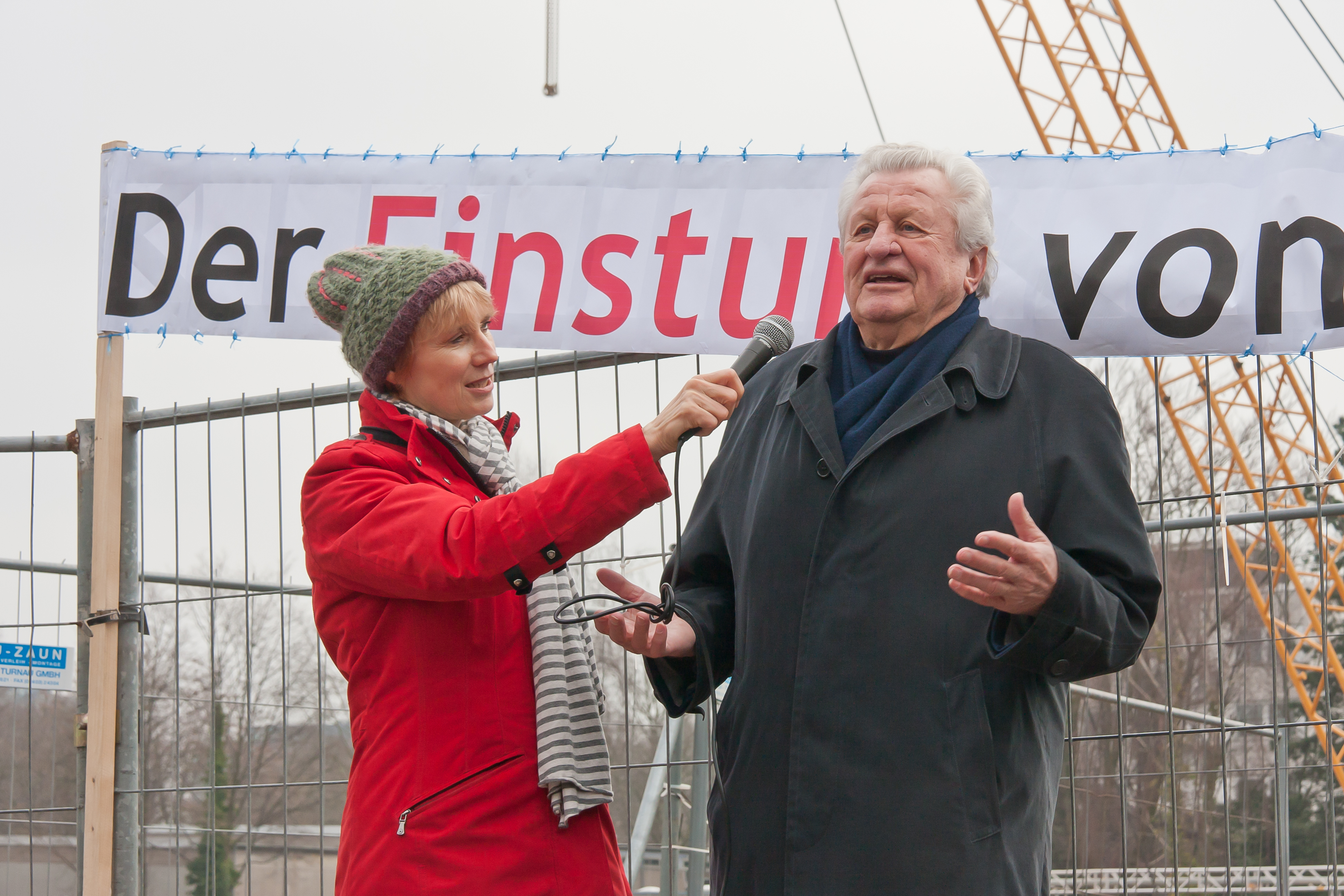 Gedenkfeier zum 4. Jahrestag des Einsturzes des Historischen Archivs Köln Foto: Gedenkveranstaltung der Initiative „Köln kann auch anders“. Der Bauingenieur Prof. Stefan Polónyi vertritt dort die Meinung, dass die Errichtung des Besichtigungsbauwerks für die Staatsanwaltschaft überflüssig sei, weil der Einsturz des Archivs „nur durch zu viel Pumpen“ verursacht worden sein könnte (lt. Artikel des Kölner Stadtanzeigers).